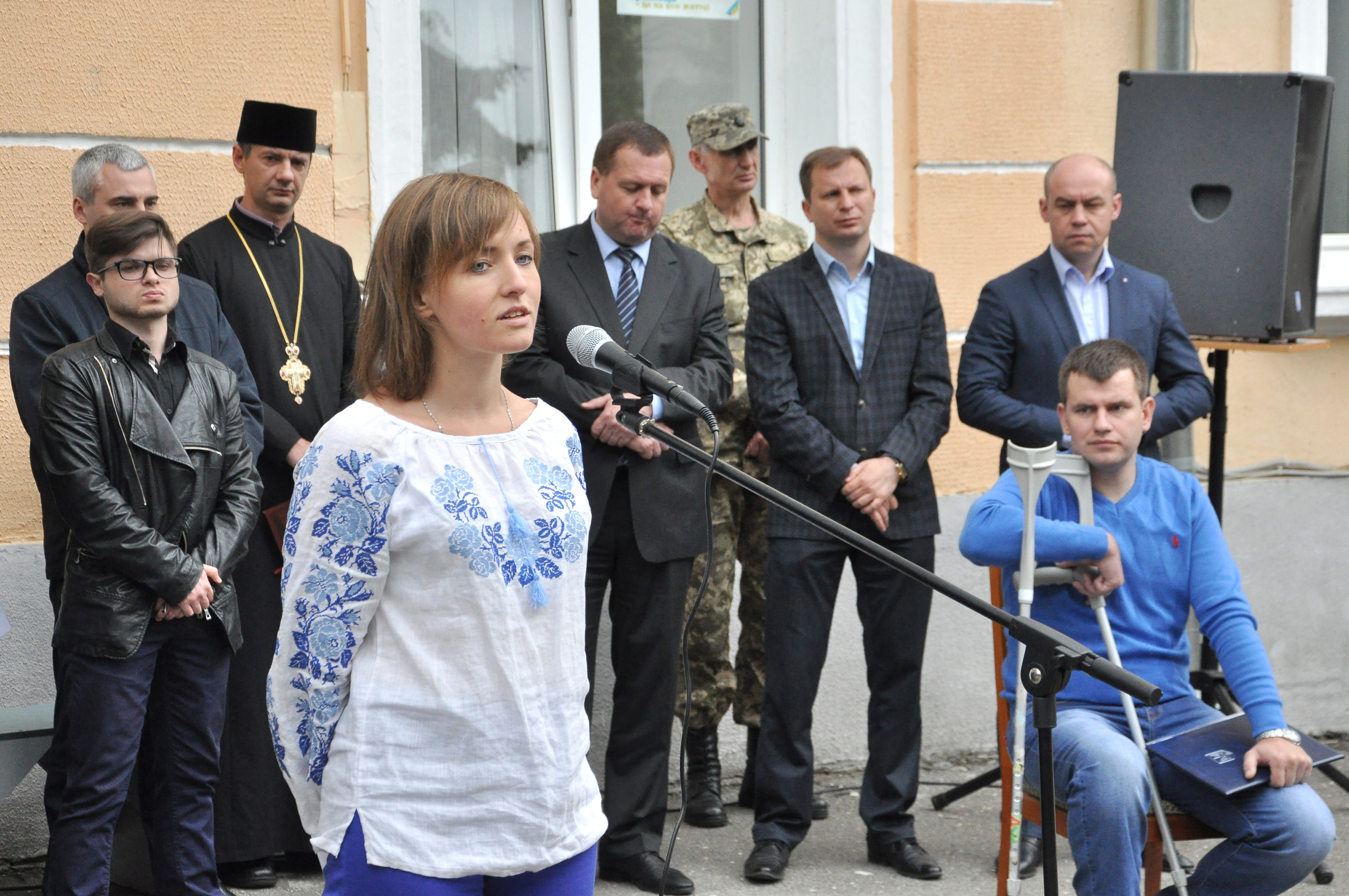 Відкриття пам'ятної дошки українському військовику, який загинув у зоні АТО, Олександрові Орляку на фасаді Тернопільської школи № 5. Виступає українська поетка Анастасія Дмитрук. Стоять — Андрій Орляк (брат Олександра), Леонід Бицюра, о. Віталій Козак (синкел Тернопільсько-Зборівської архієпархії УГКЦ), Василь Хомінець (голова Тернопільської обласної ради), військовий, Степан Барна (голова Тернопільської ОДА, Сергій Надал (міський голова Тернополя). Сидить — учасник АТО Дмитро Мерзлікін.